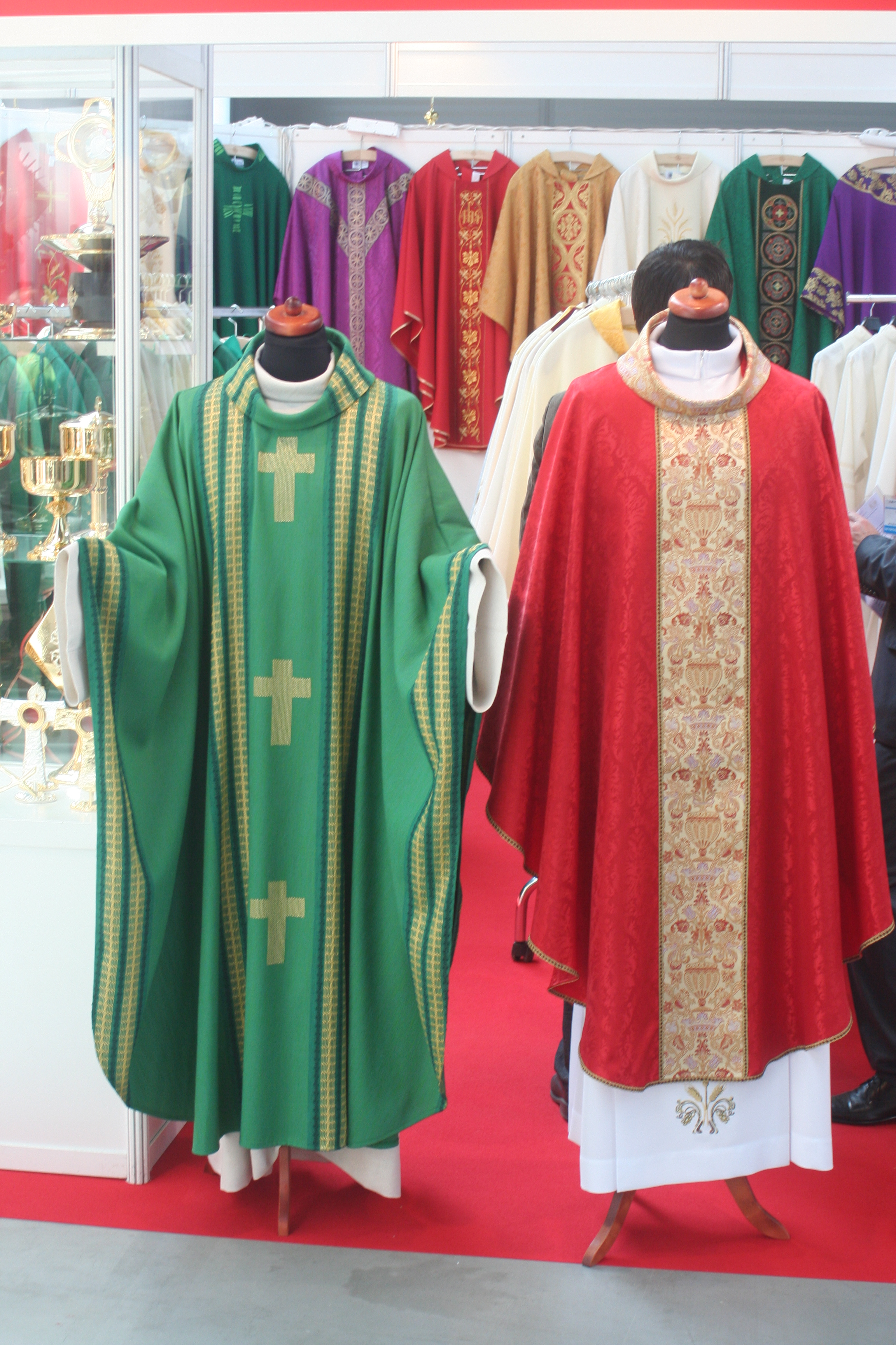 Szaty liturgiczne na stoisku jednej z firm na targach SACROEXPO 2013 w Kielcach